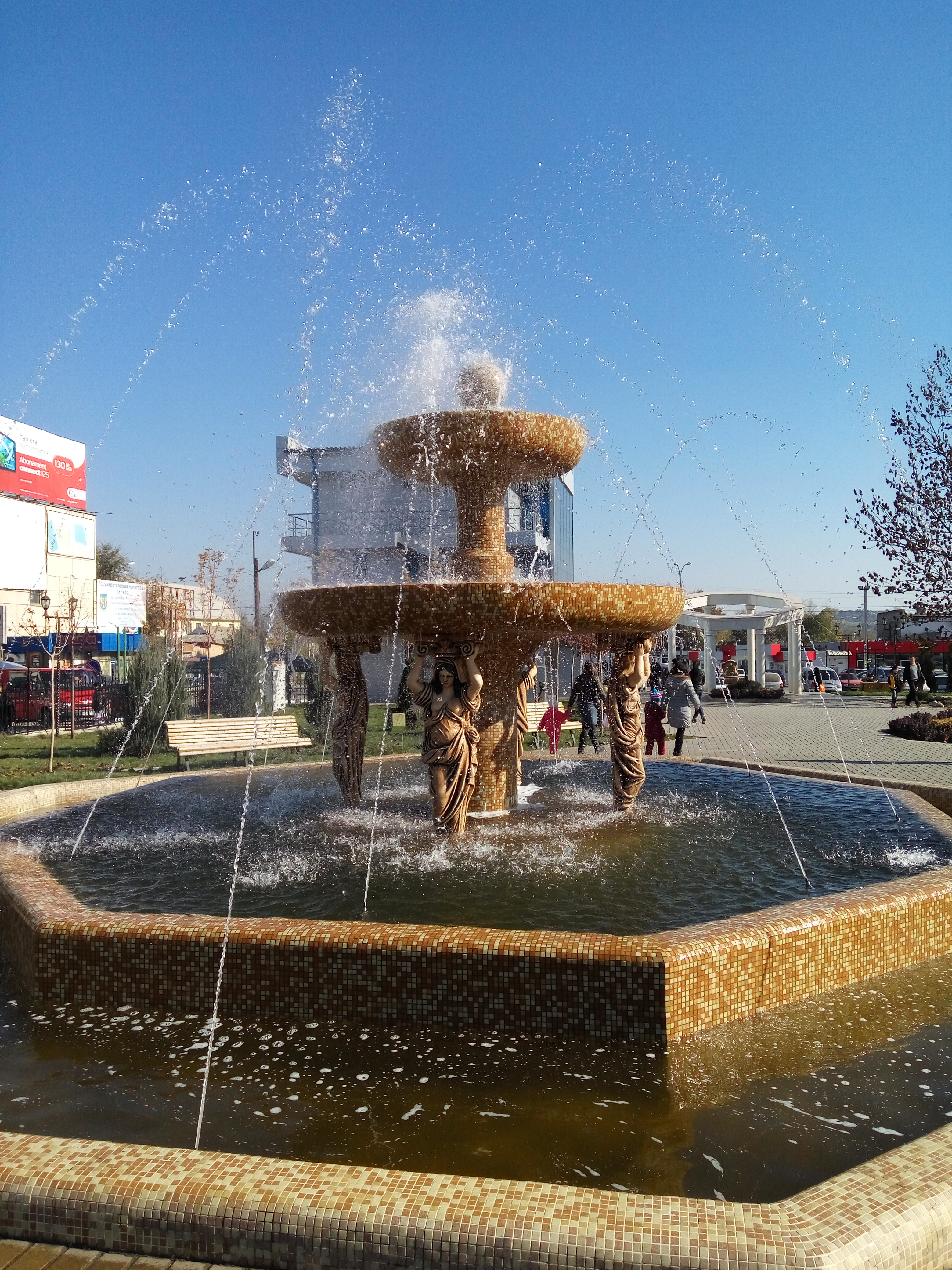 Фонтан